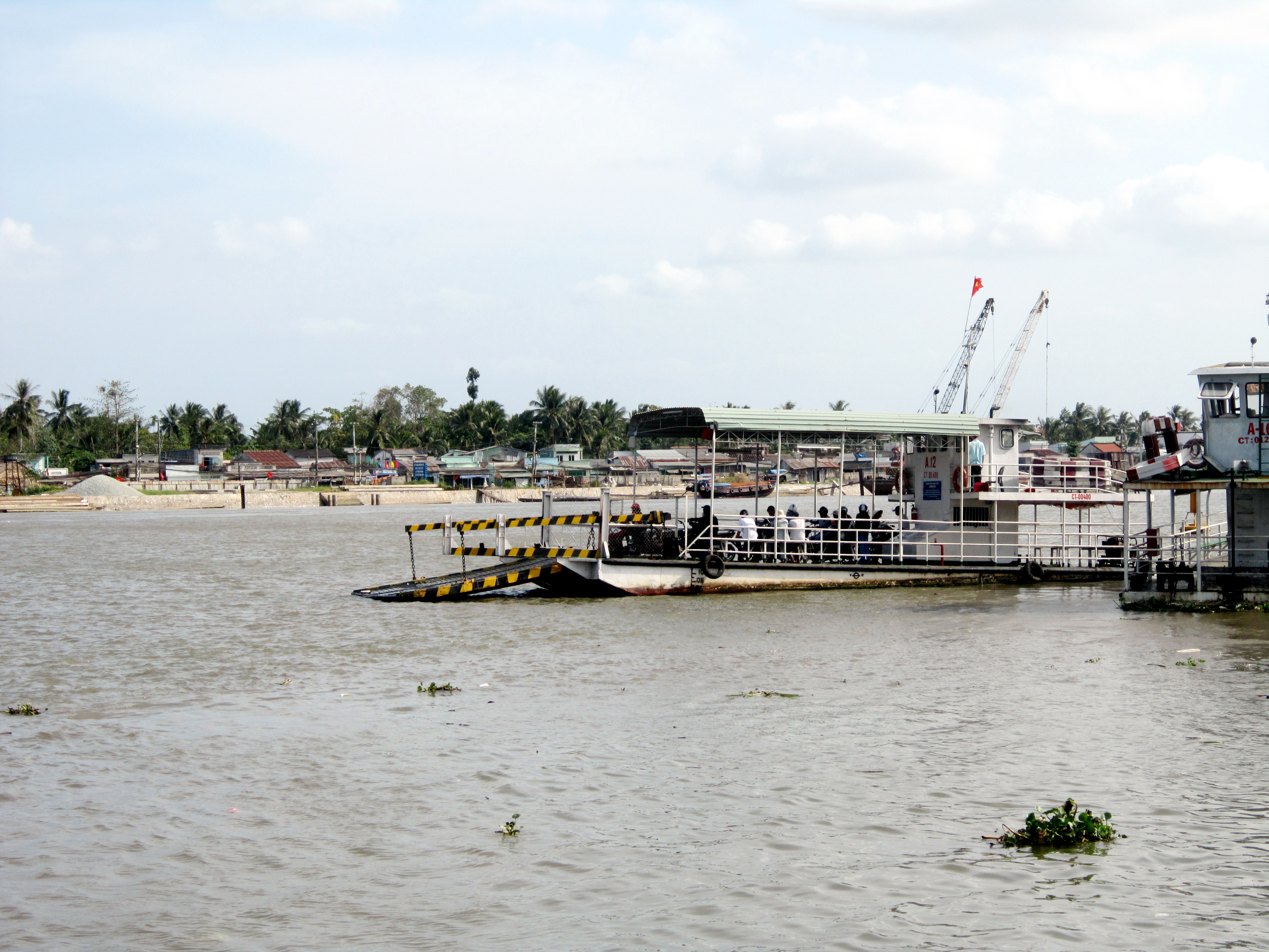 Bến phà Xóm Chài tại trung tâm thành phố Cần Thơ, Việt Nam.